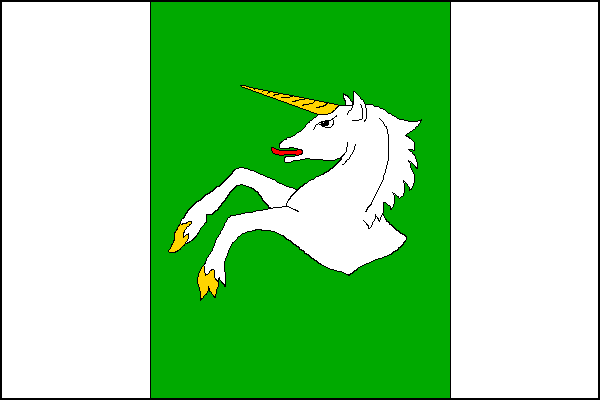 vlajka, Radslavice, okres Přerov